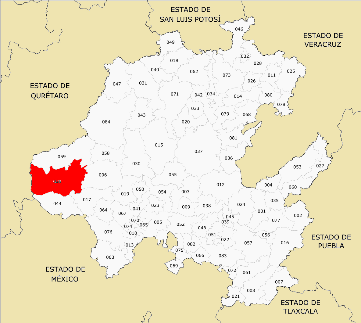 Municipios de Hidalgo